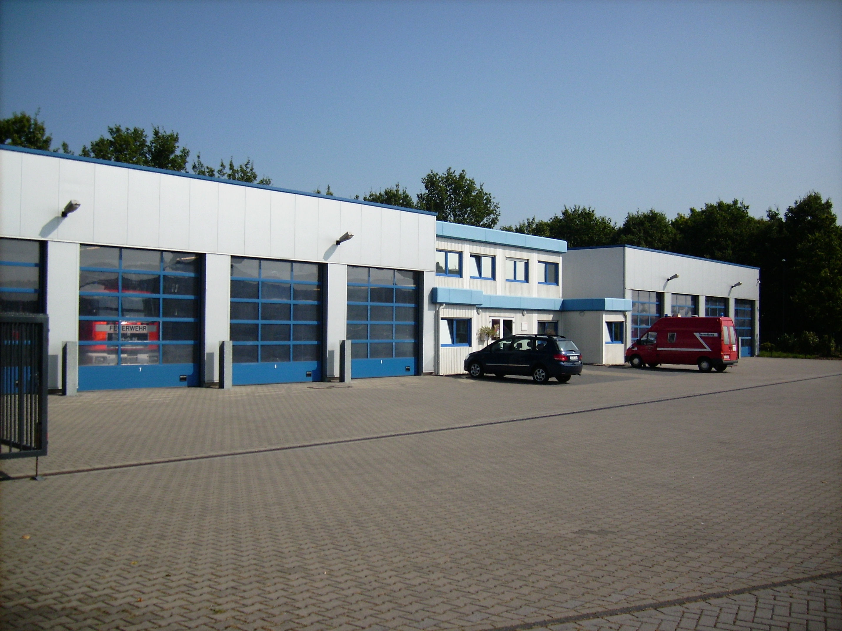 Feuerwache 8 Köln-Ostheim